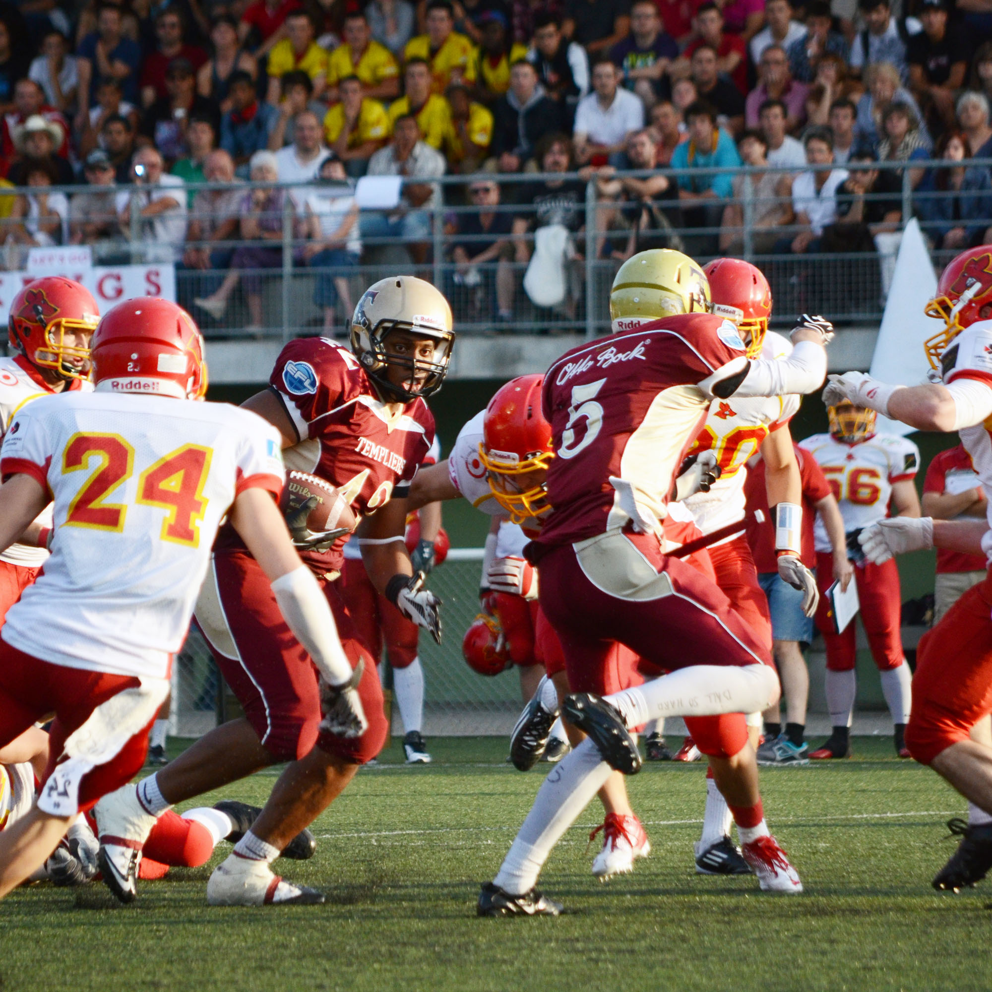 Finale du championnat de France de football Américain 2012, Kangourous de Pessac - Templiers d'Élancourt